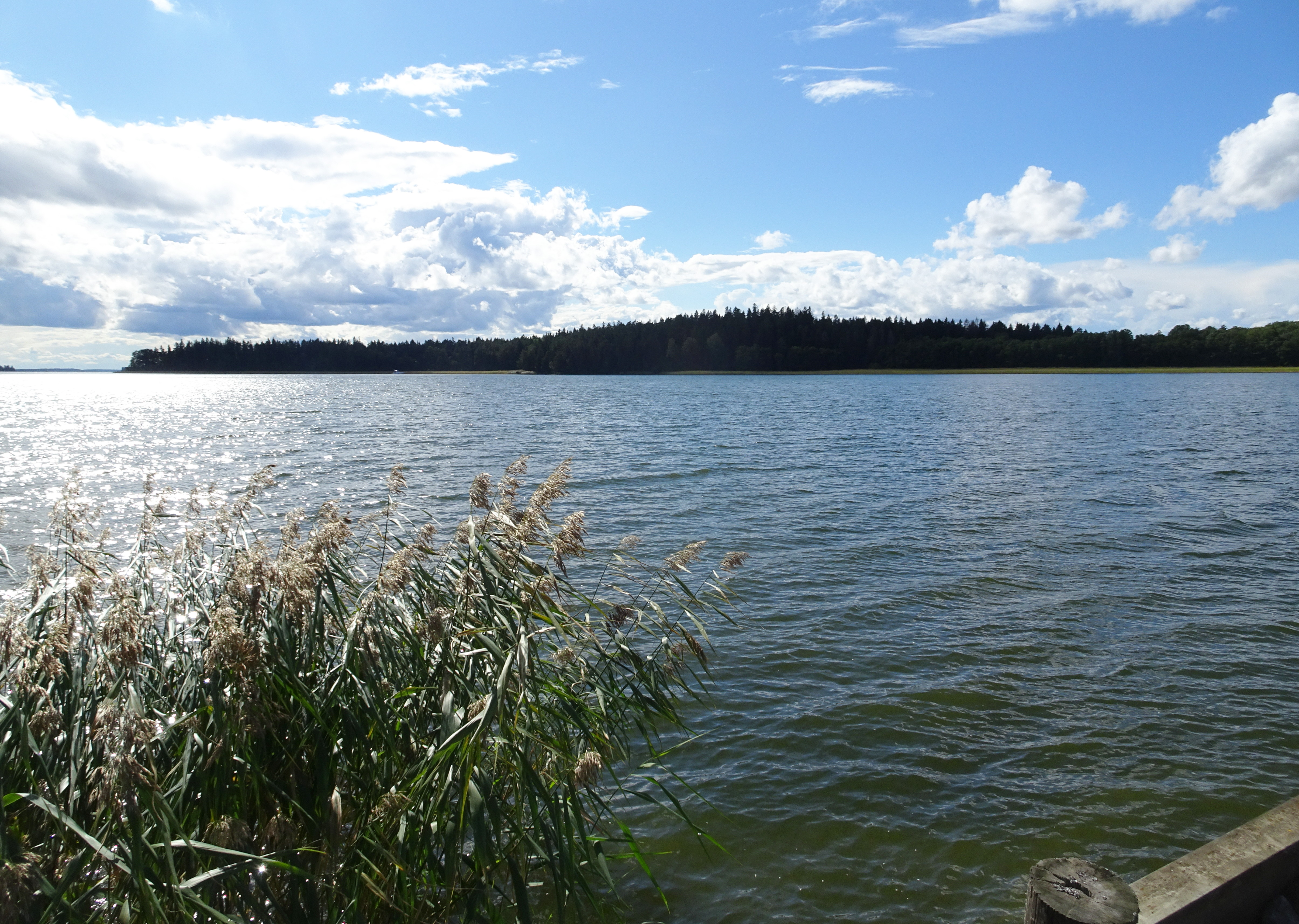 Ön Svalgarn i Norra Björkfjärden sedd från Sjö herrgård i Upplands-Bro